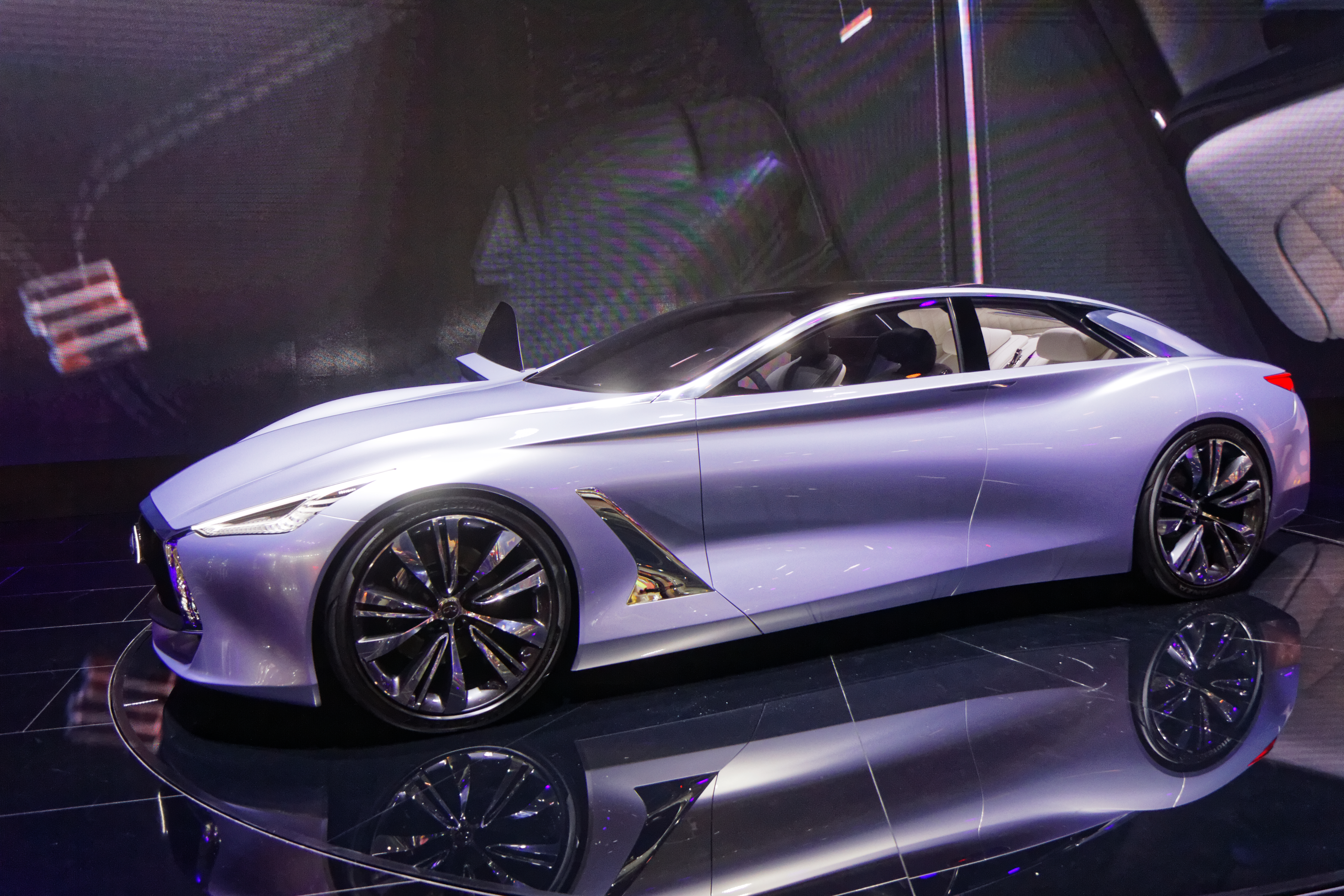 Une Infiniti Q80 Inspiration présentée lors du mondial de l'automobile de Paris 2014.